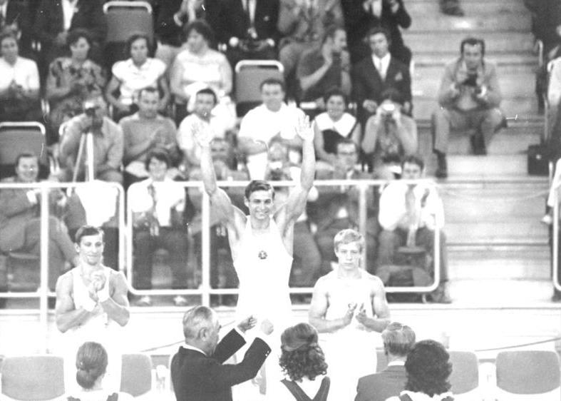 ADN-ZB-Olympiadist- Lieb.-2.9.72-ma-München: XX. Olympische Sommerspiele-Turnen.Der 29jährige Klaus Köste (Mitte) holte am Abend des 1.9.1972 bei Final-Wettkämpfen an den einzelnen Geräten die ersten Olympia Goldmedaillen im Männerturnen für die DDR. Er gewann den Pferdsprung vor den beiden sowjetischen Aktiven Wiktor Klimenko (links/Silber) und Nikolai Andrianow (rechts/Bronze).